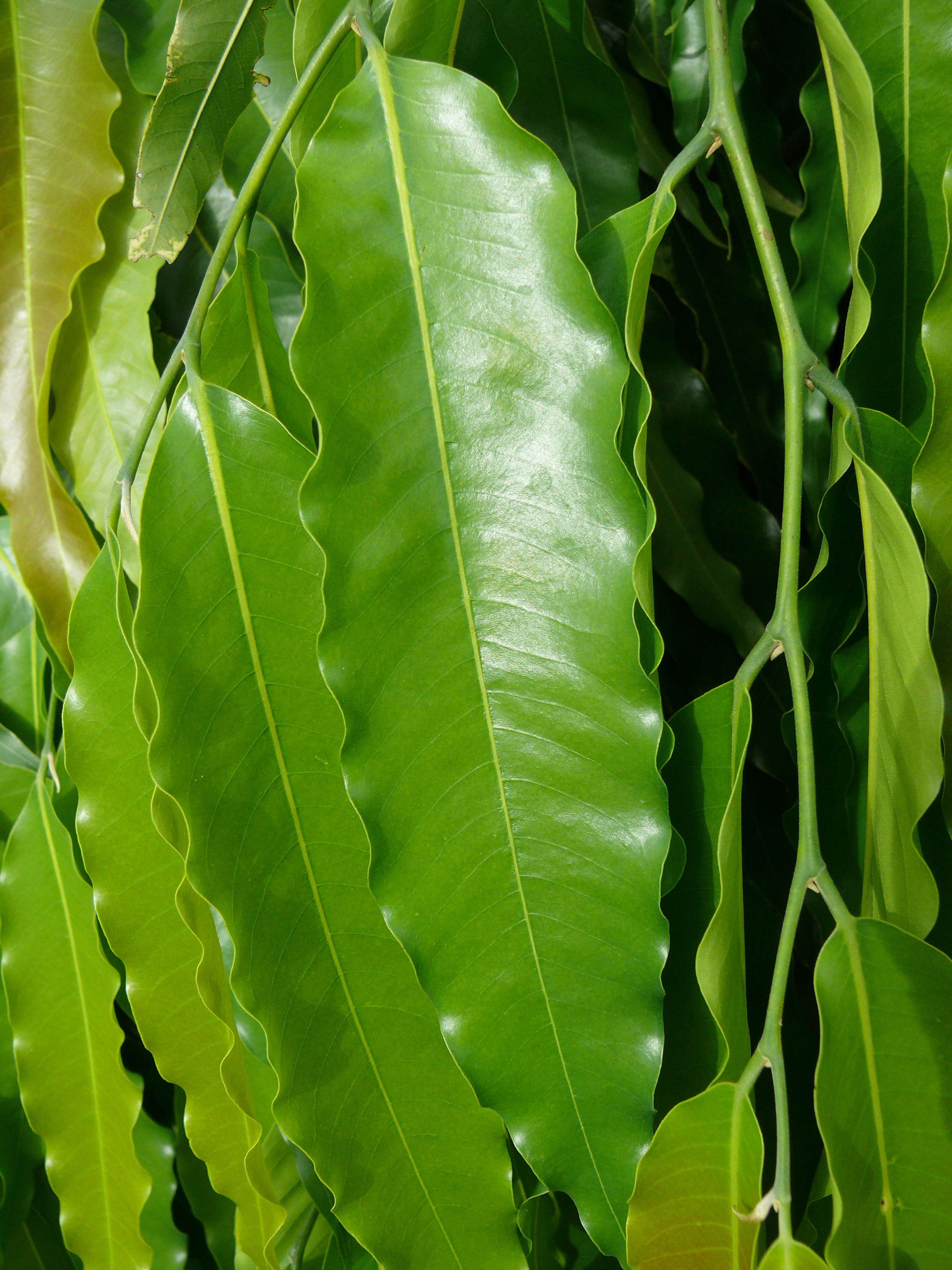 Polyalthia longifolia var. pendula - leaves